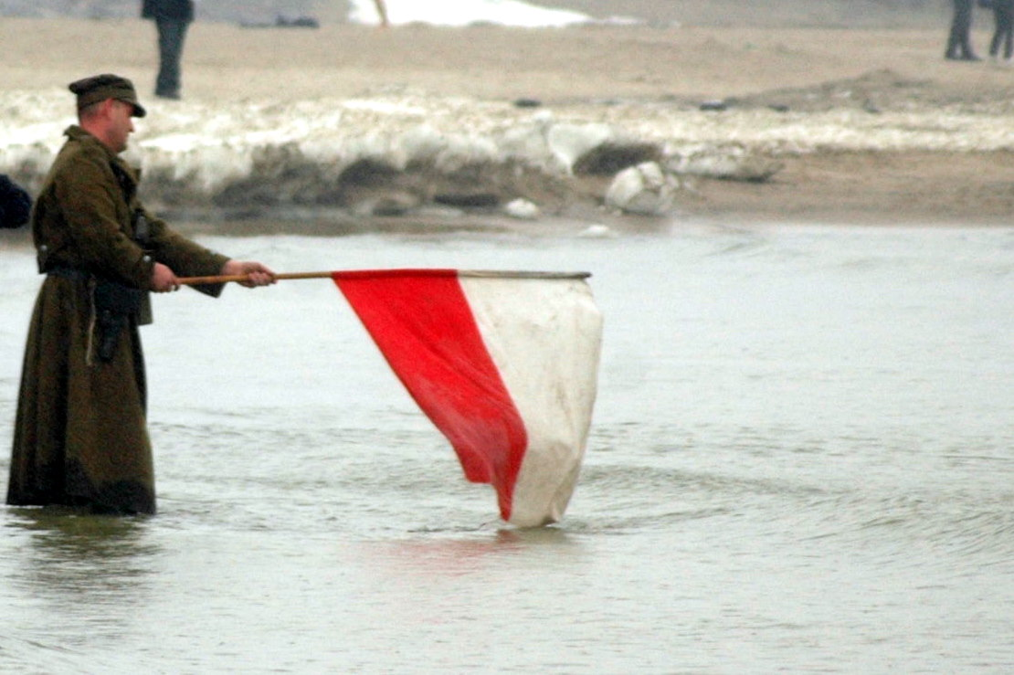 Bój o Kołobrzeg